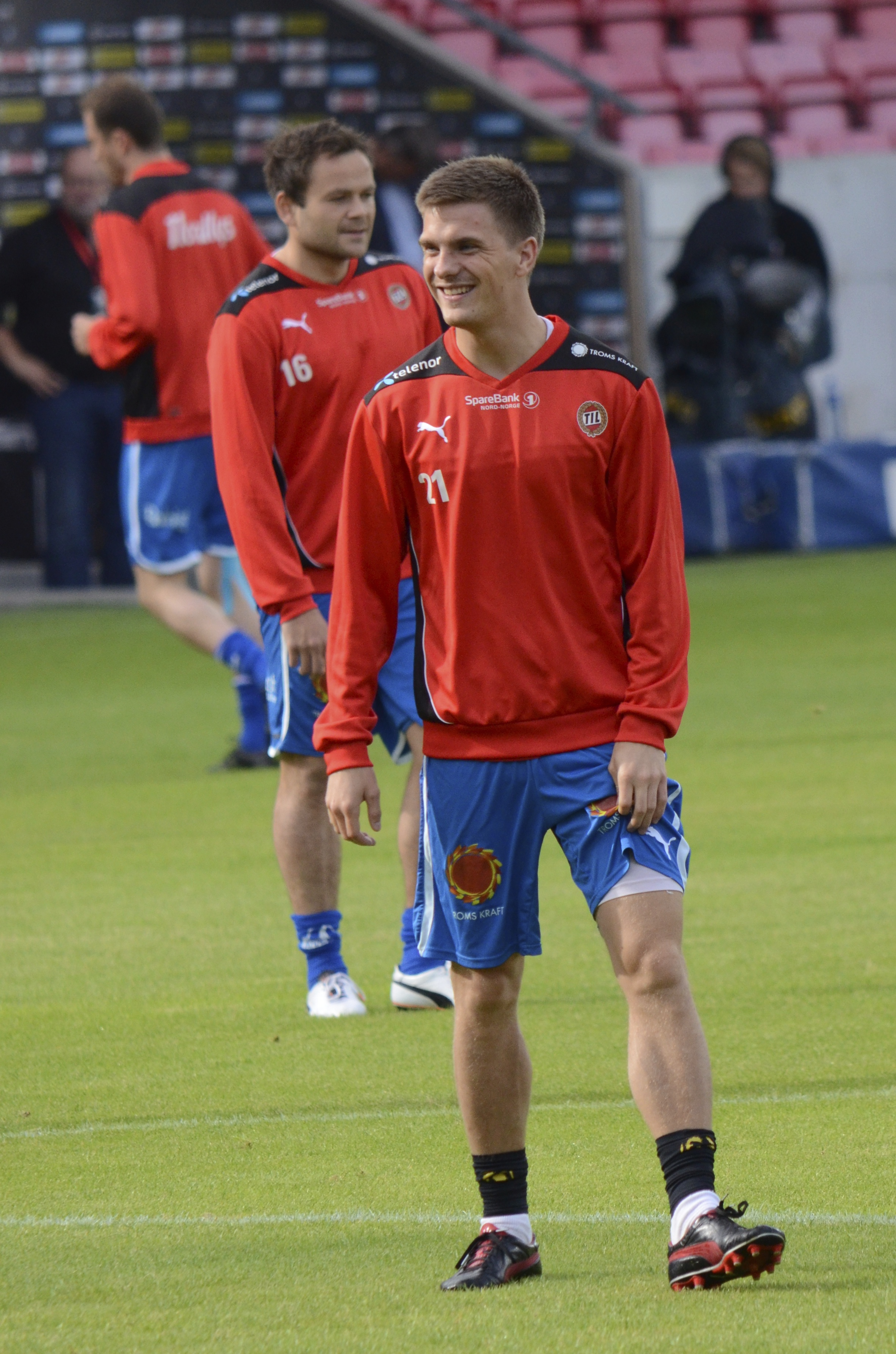 Vegard Lysvoll